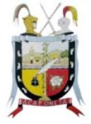 ESCUDO OFICIAL MUNICIPIO DE ACAPONETA NAYARIT (México)